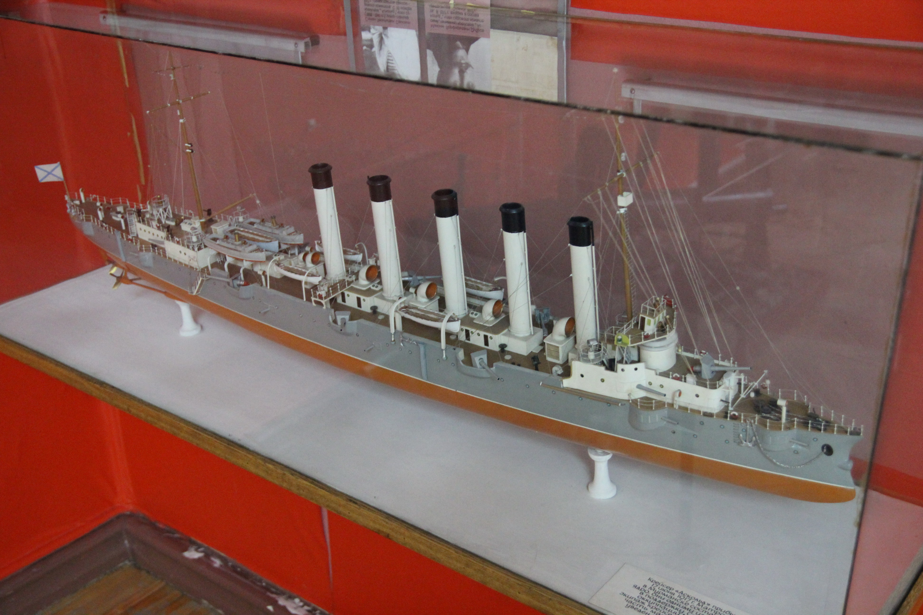 Модель крейсера Аскольд (Мурманский краеведческий музей)